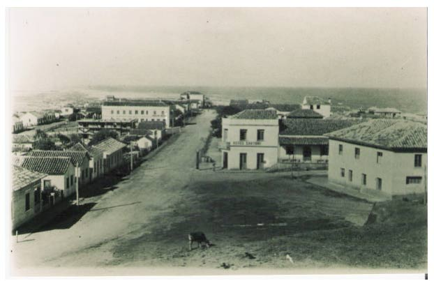 Centro de Torres, anos 30, com o Hotel Sartori no centro